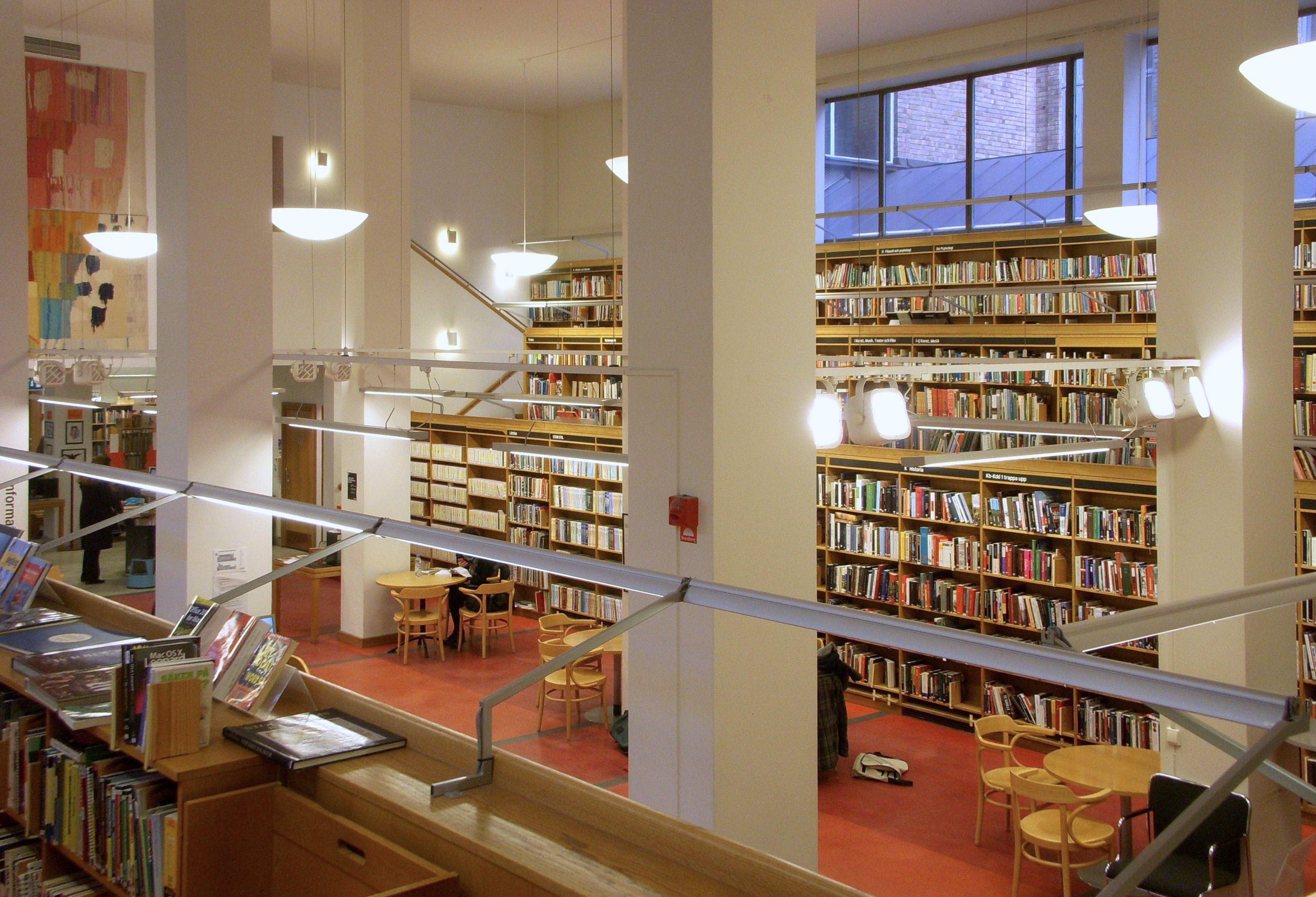 Medborgarhuset i Stockholm, biblioteket